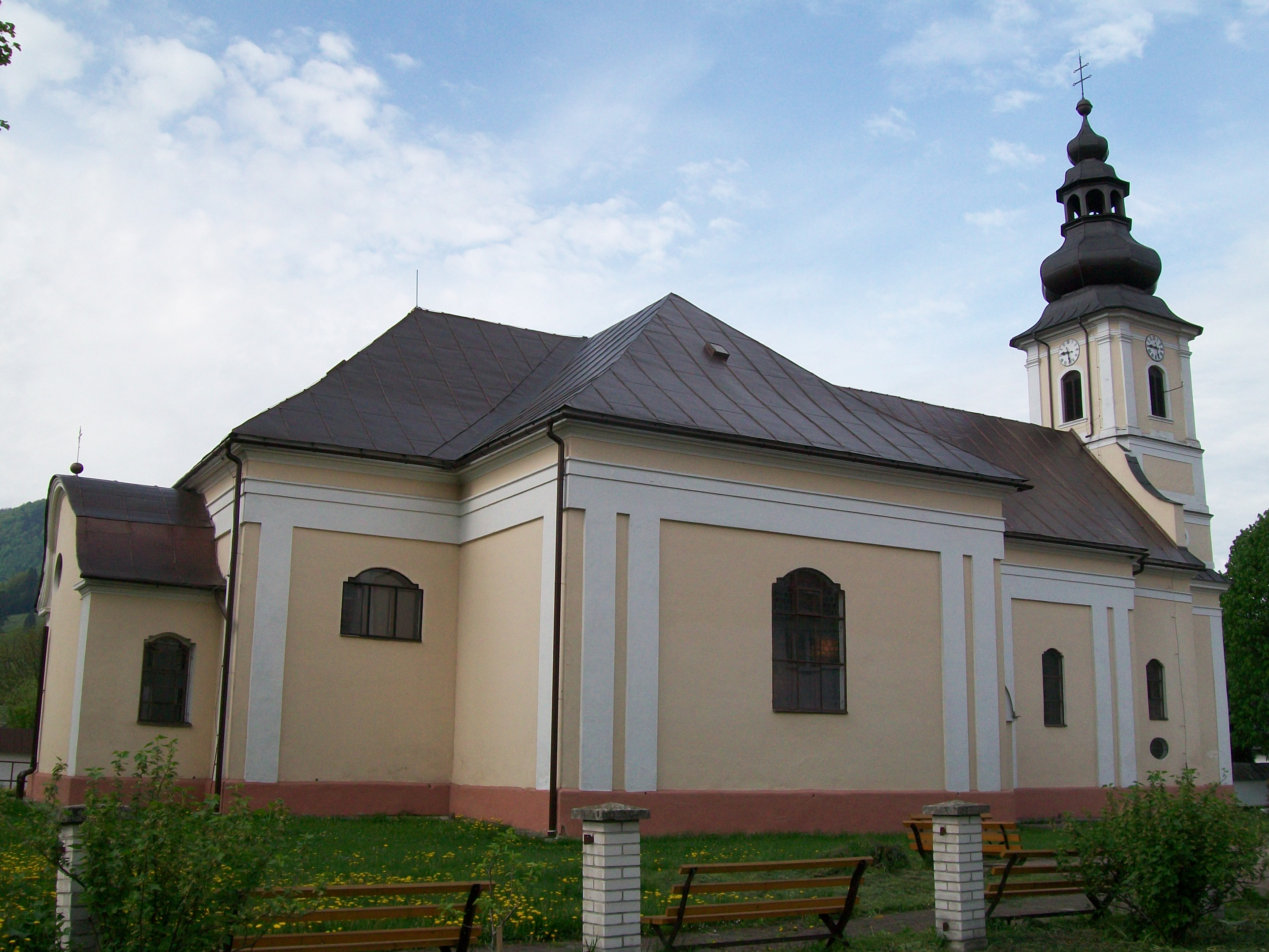 Rímsko-katolícky kostol sv. Jána Krstiteľa v Liptovskej Osade